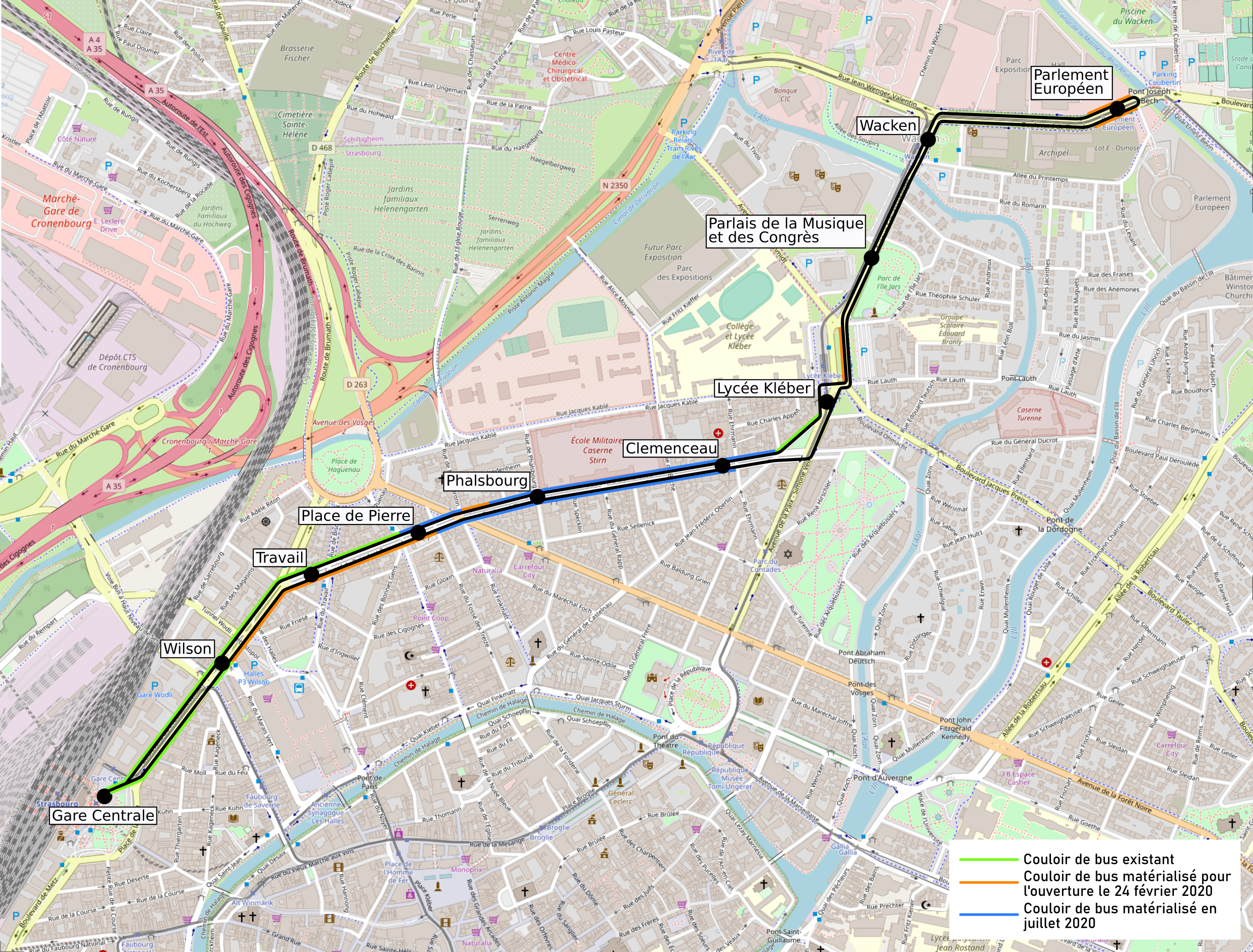 Projet de la ligne H avec les couloirs de bus